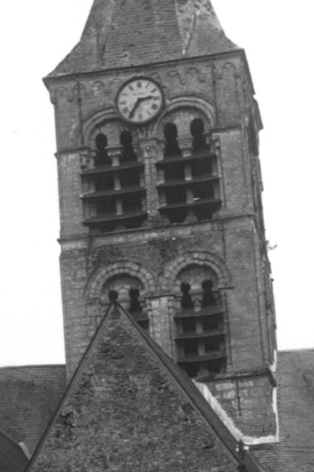 Ancien clocher roman, vue depuis le nord.